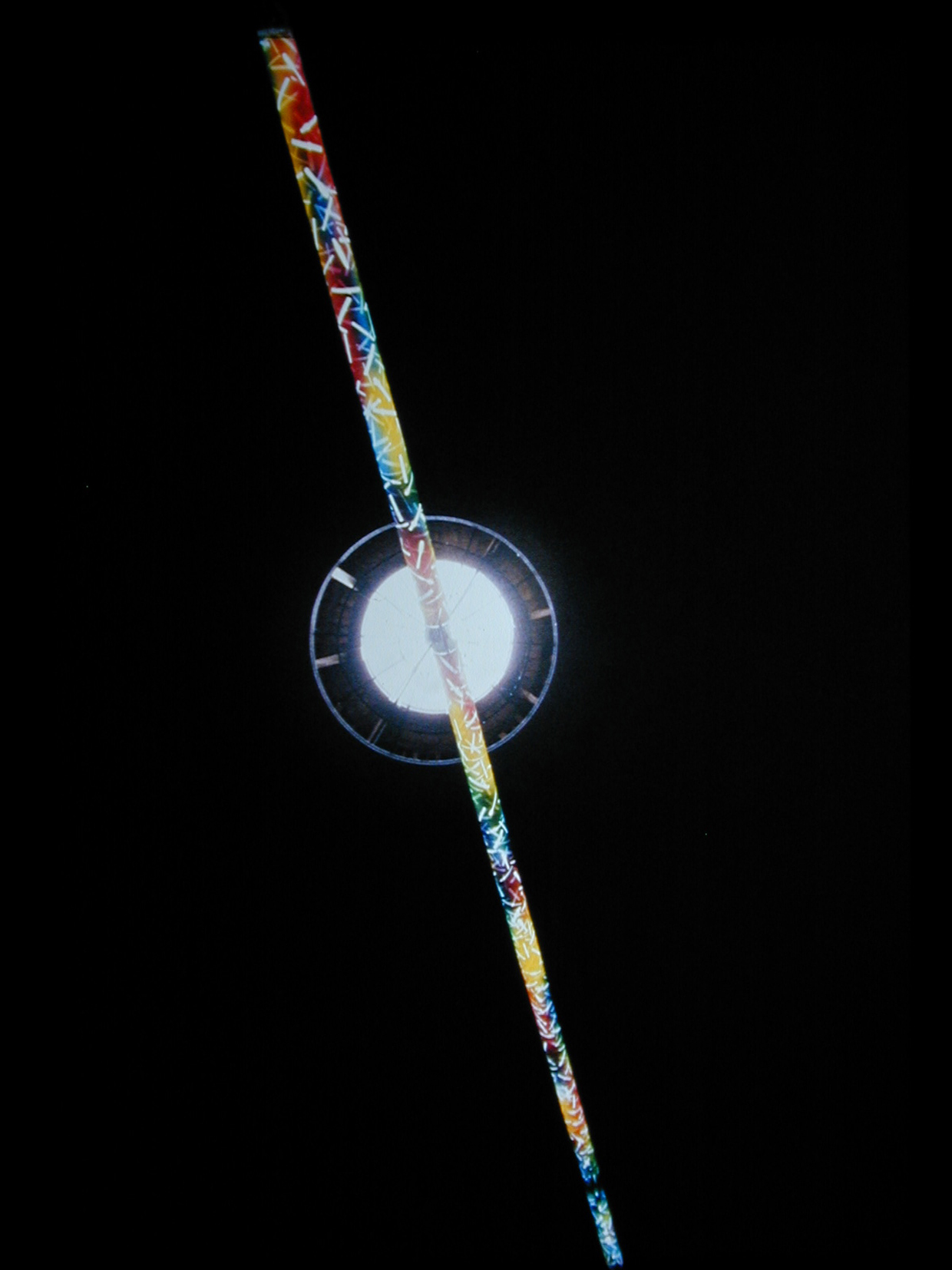 Néon et tube de Plexiglas peint à l'acrylique